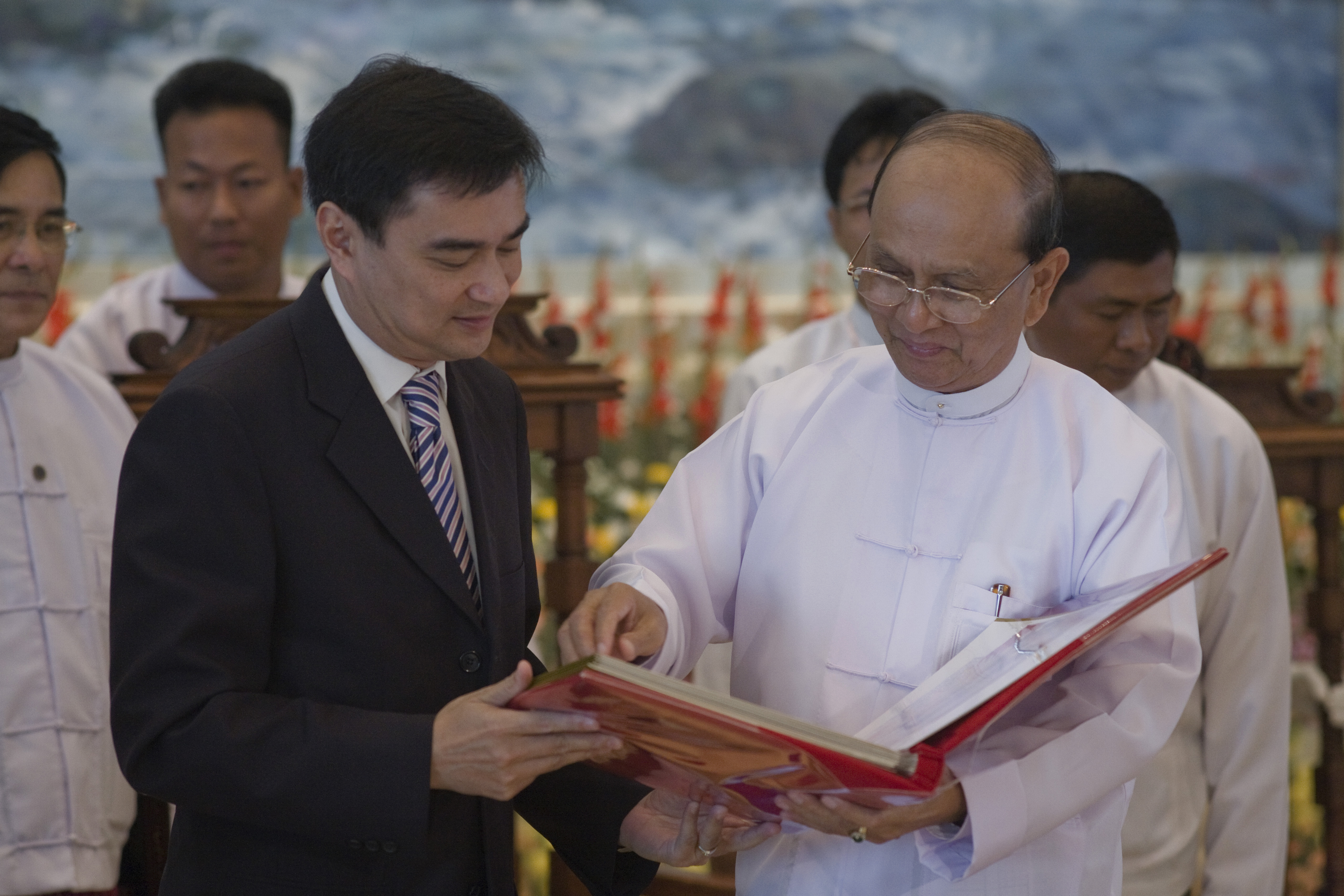 นายกรัฐมตรีพม่าเป็นเจ้าภาพเลี้ยงอาหารกลางวันเพื่อเป็นเกียรติแก่นายกรัฐมนตรีและคณะ ณ ห้องจัดเลี้ยง เรือนรับรอง Zeyarthiri Beikman นครเนปิดอว์ สหภาพพม่า วันจันทร์ ที่ 11 ตุลาคม พ.ศ.2553 (Photographer attached to the Prime Minister of the Kingdom of Thailand : Peerapat Wimolrungkarat / พีรพัฒน์ วิมลรังครัตน์)